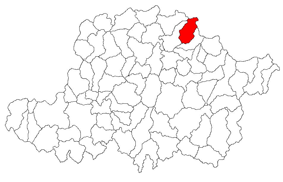 Categorie:Hărţi ale judeţului Arad